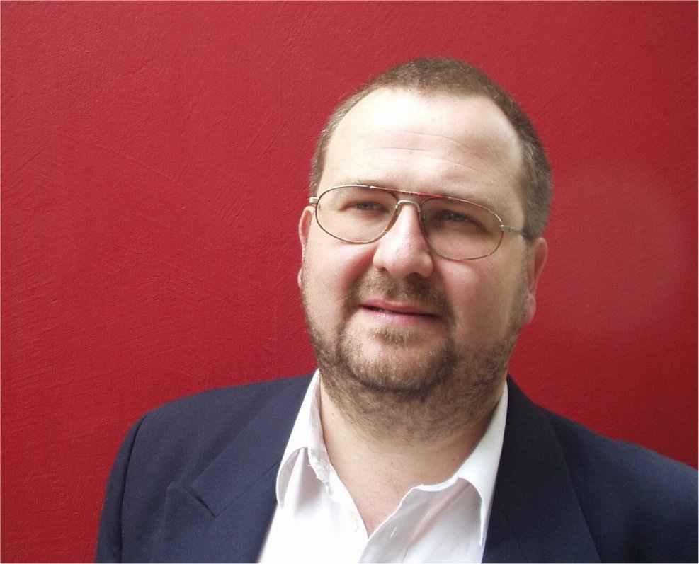 Johannes Michael Schnarrer aufgenommen im Haus Döbling